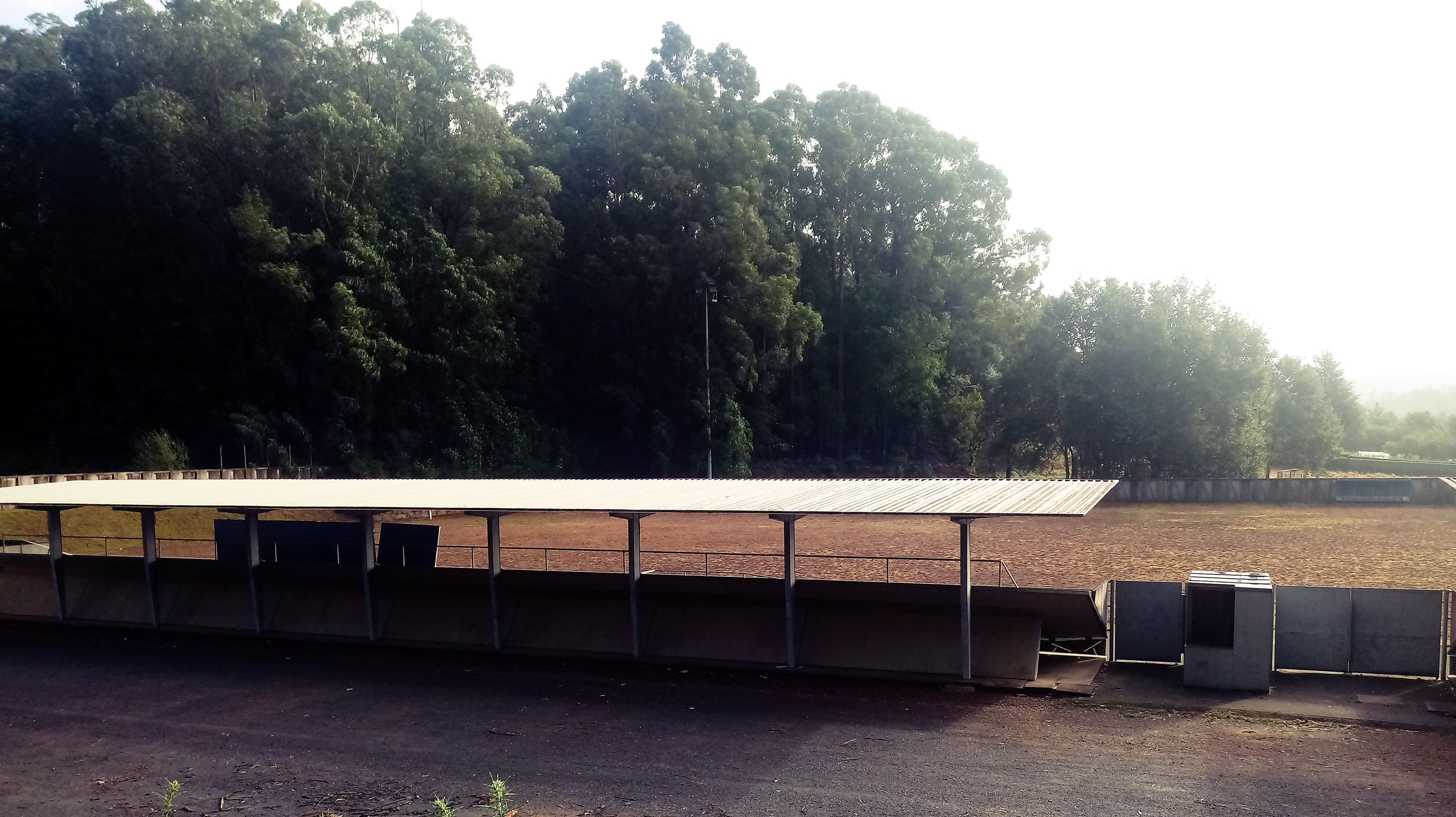 Campo de fútbol de Lameiro, inaugurado en 1997 e reformado no 2010, este é o aspecto que presenta no 2020. O seu deseño recibiu un premio da Deputación da Coruña.